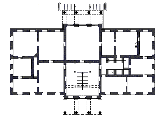 enfiláda ; půdorys zámku v Kostelci nad Orlicí